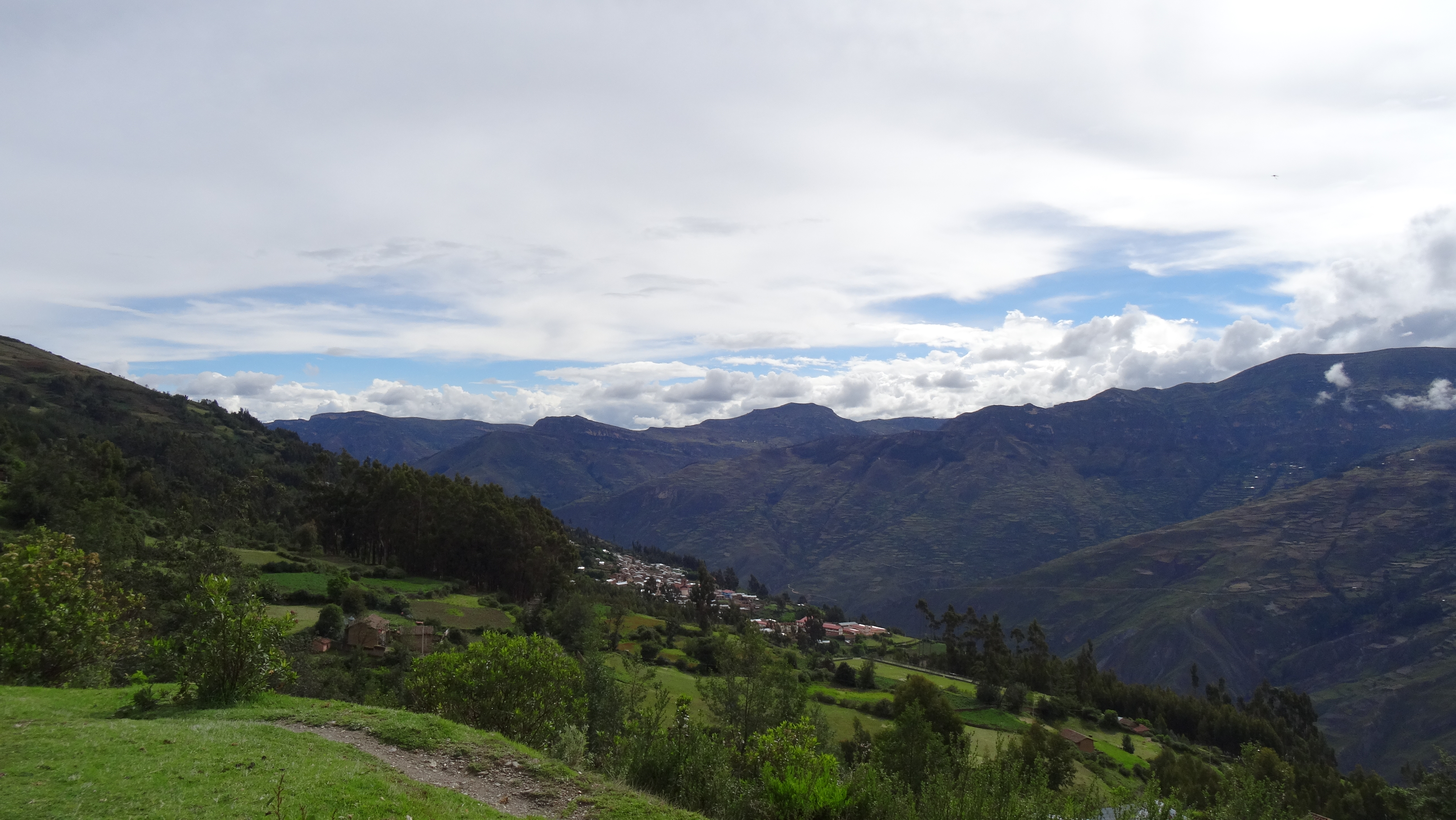 Vista del plano desde la bajada.